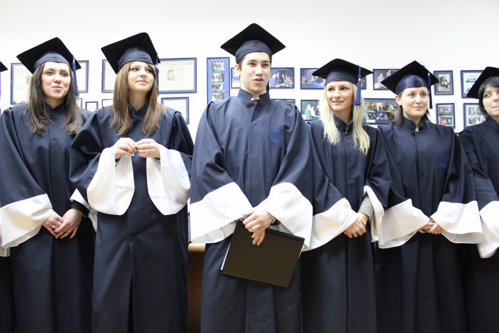 Diplomanti studija Zdravstvenog veleučilišta.